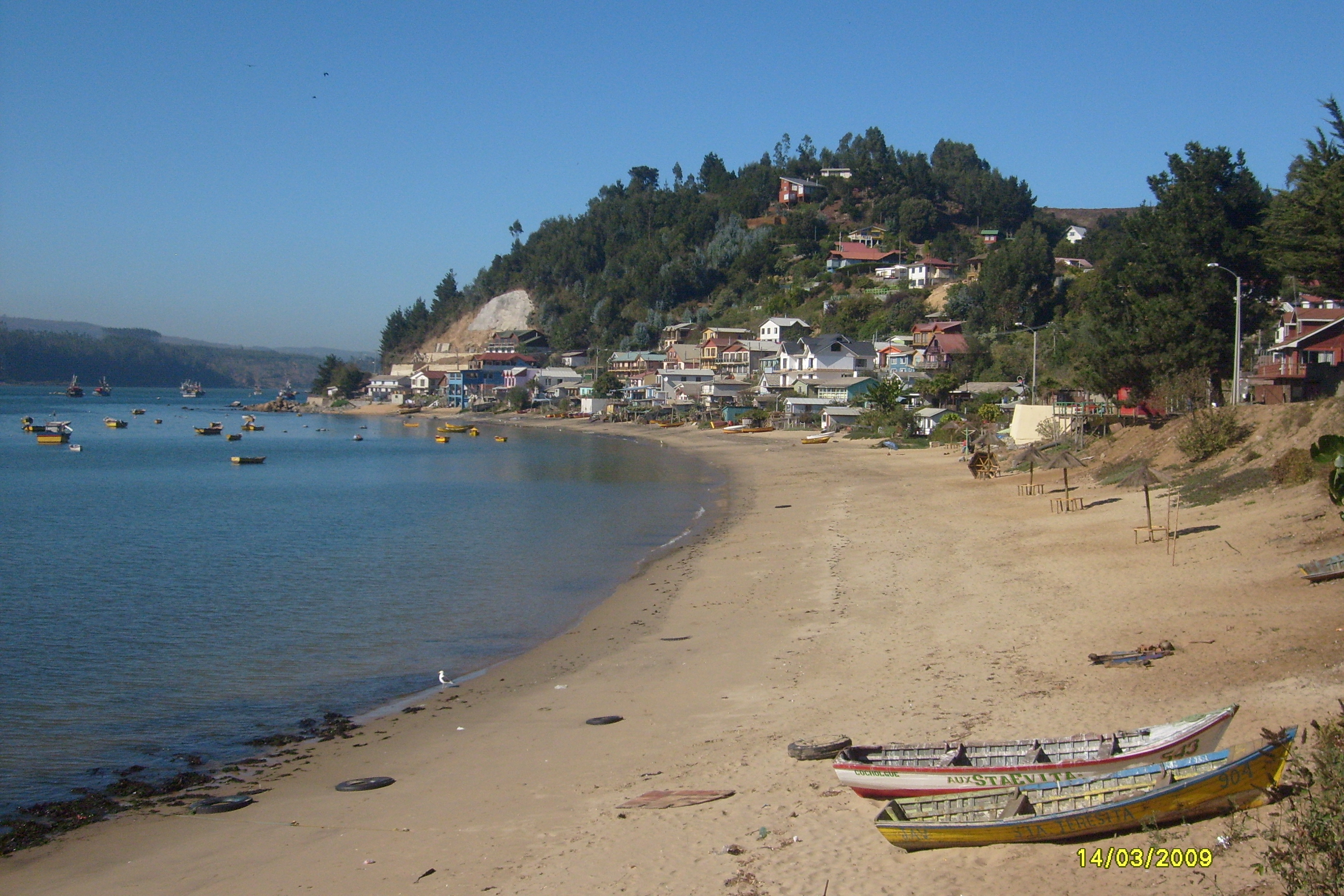 Balneario en VIII Región